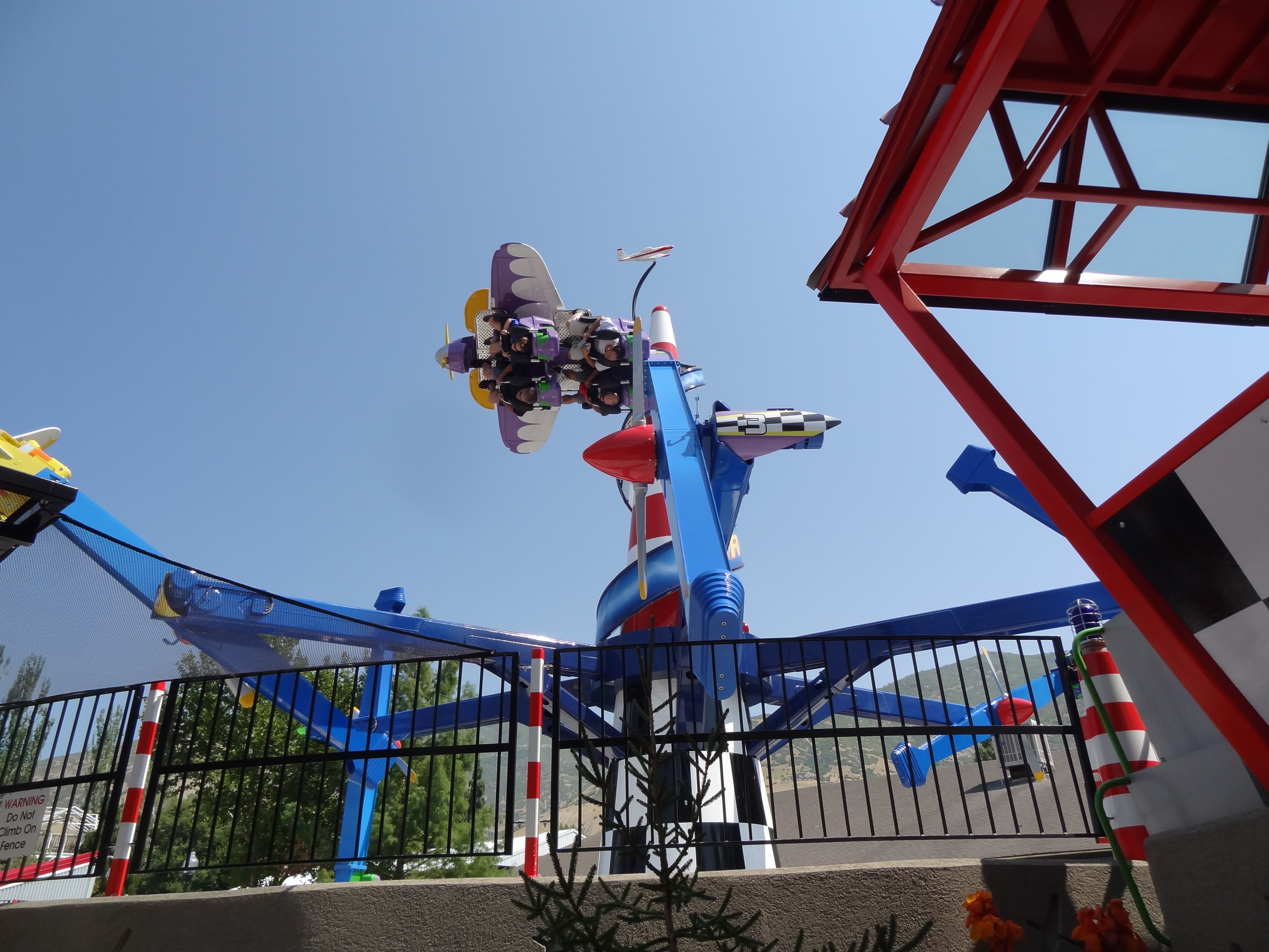 Zamperla Air Race at Lagoon